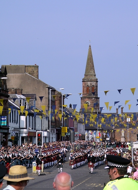 Изглед от град Анан